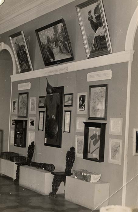 Зарайск. Фото из коллекции ГМЗ "Зарайский кремль"